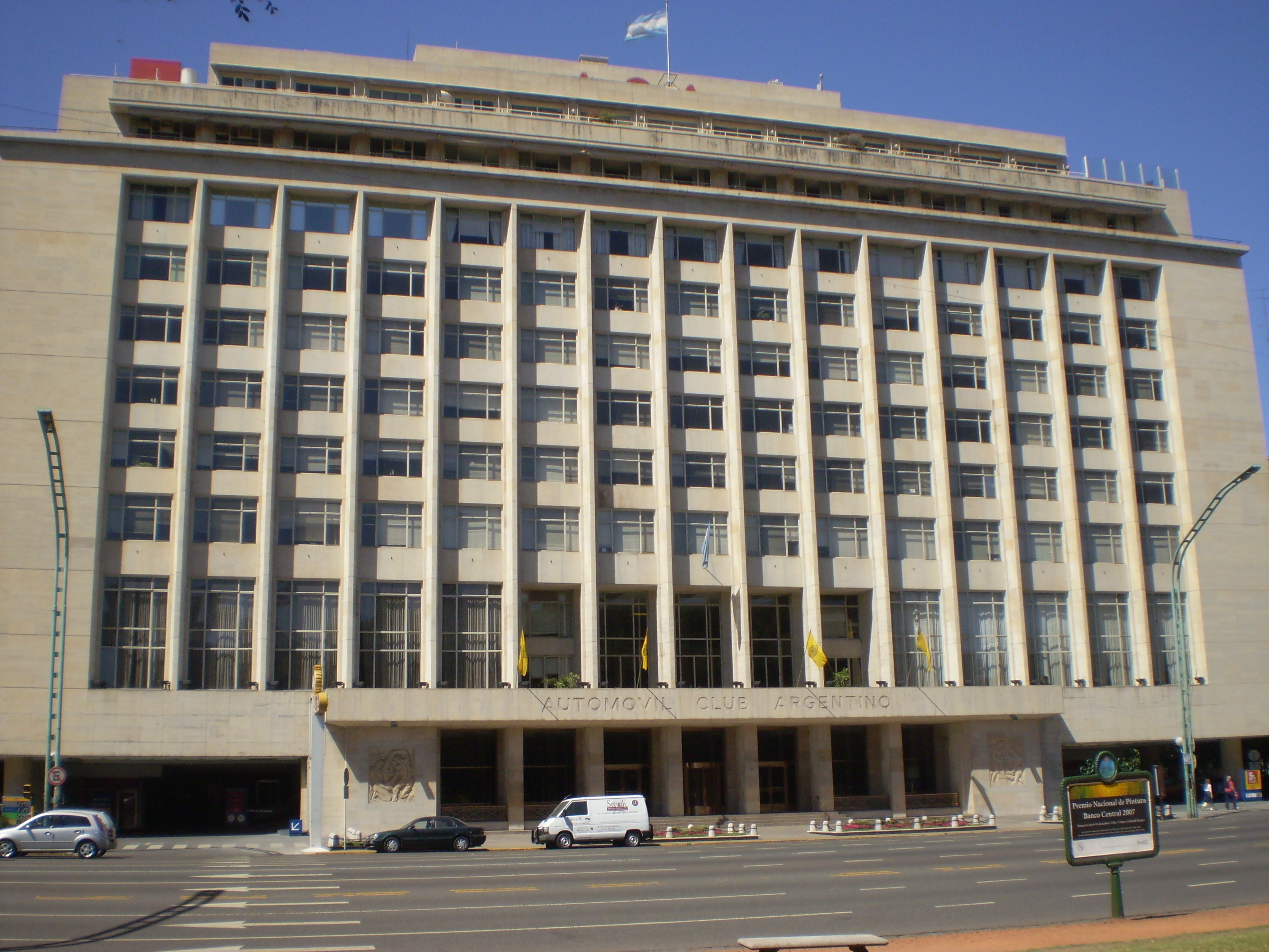 Sede central del Automóvil Club Argentino ACA en Buenos Aires